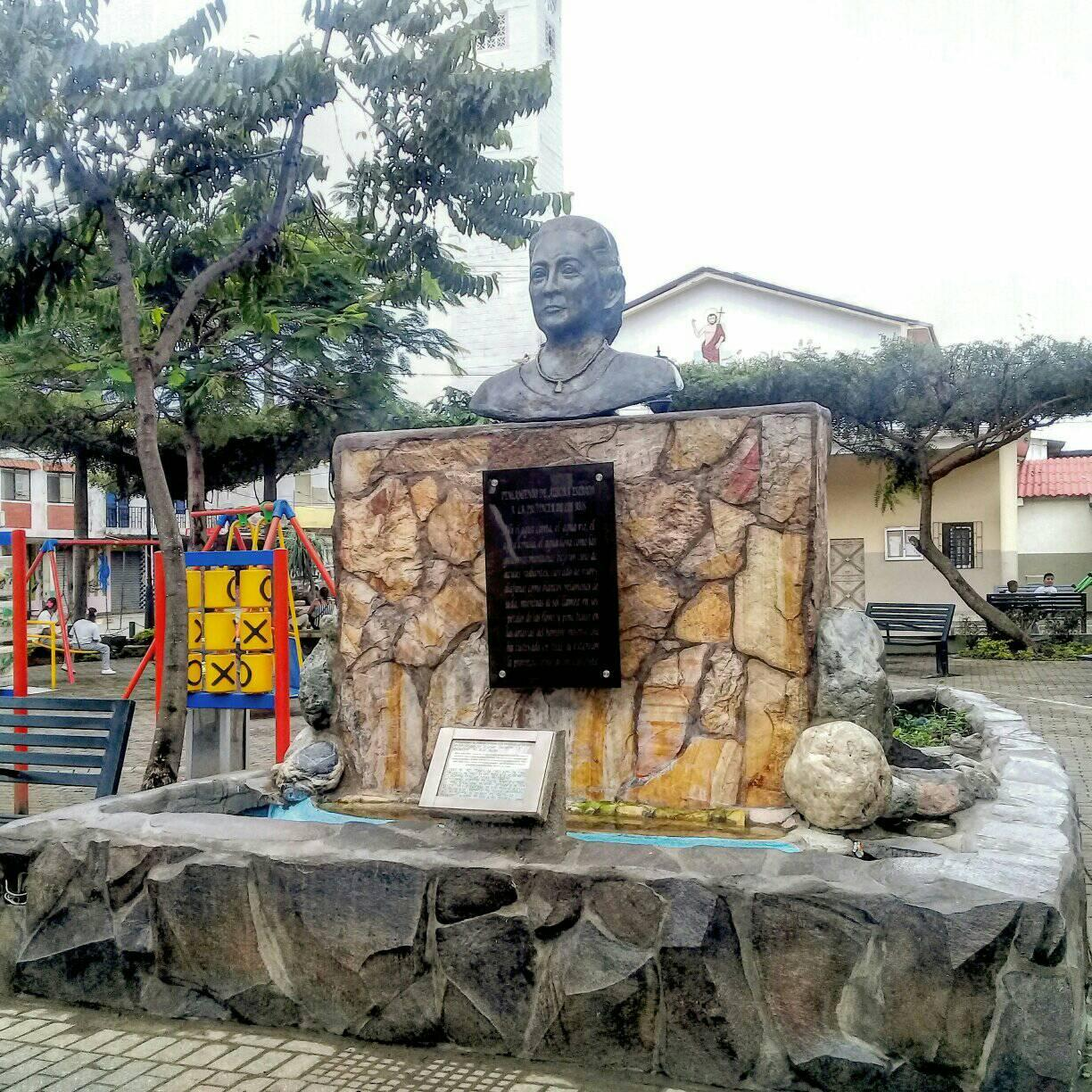 Busto a Aurora Estrada de Ramírez.